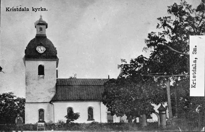 Kyrkan mot söder. Vykort. Avfotografering. Kategori: (01) Exteriörer Kyrkan mot söder. Vykort. Avfotografering.